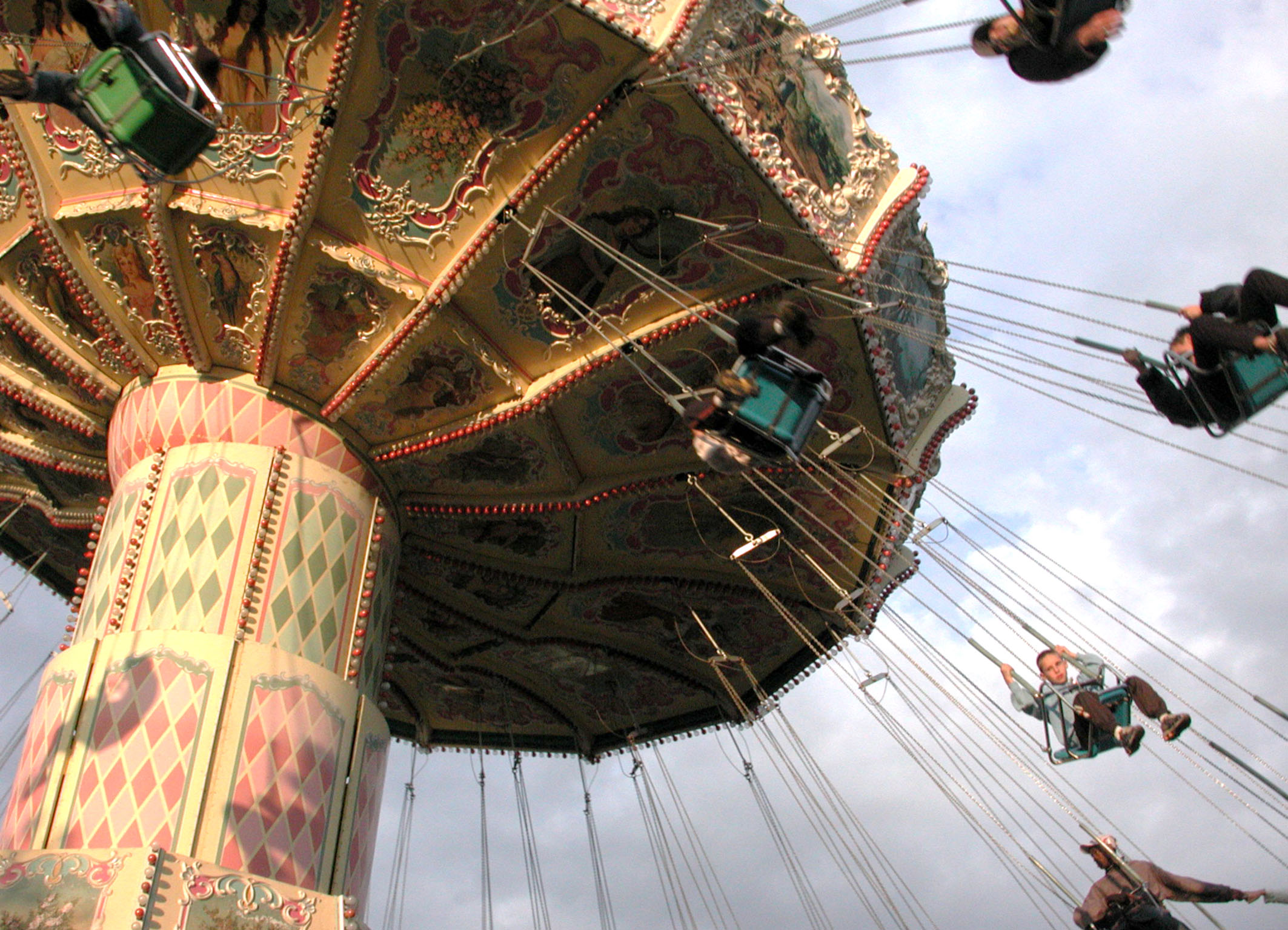 Walibi Lorraine